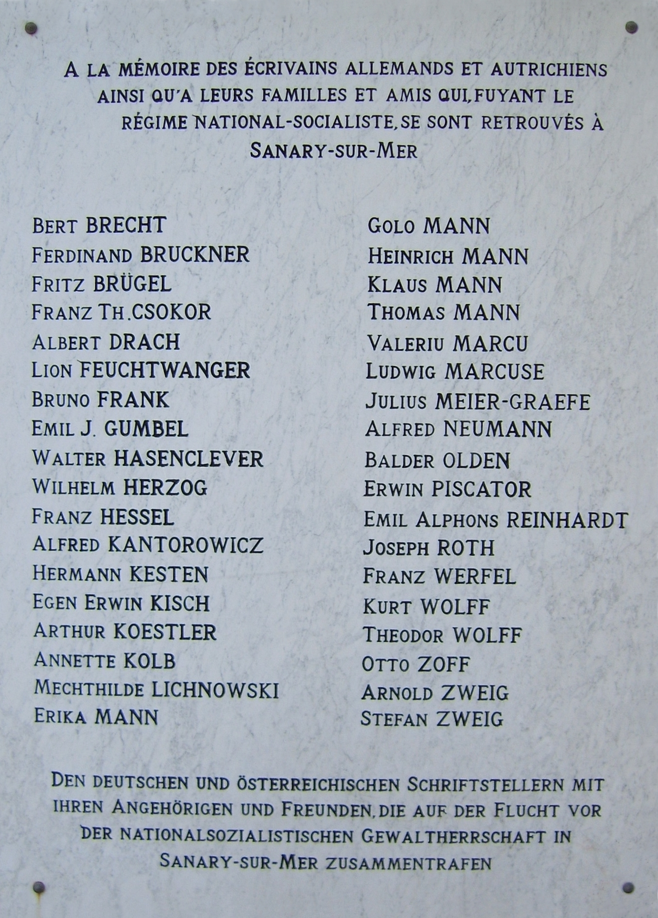 Gedenktafel für die deutschen und österreichischen Flüchtlinge am Fremdenverkehrsbüro von Sanary-sur-Mer, ursprünglich enthüllt am 18. September 1987